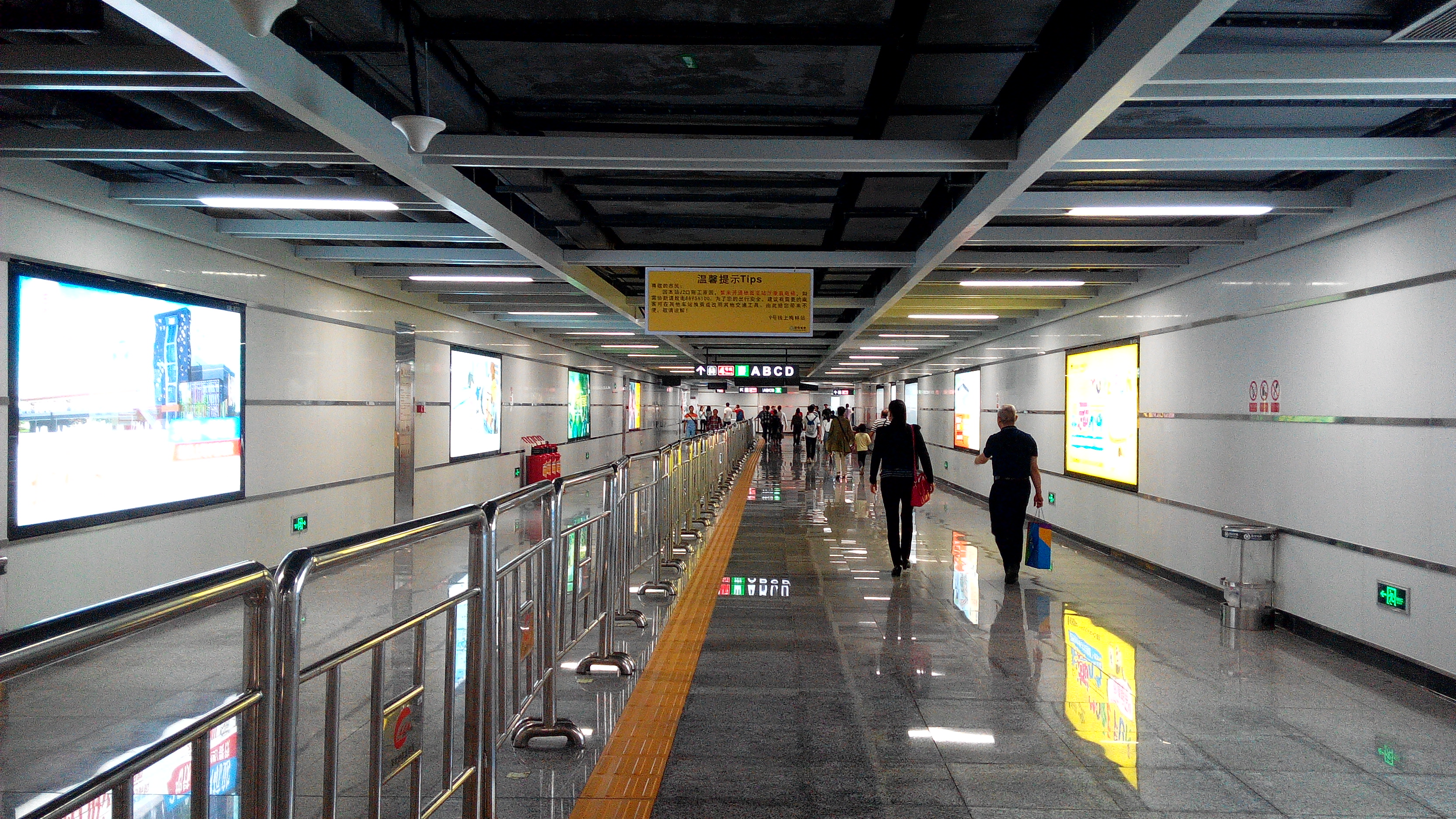 深圳地铁4、9号线 上梅林站 换乘通道